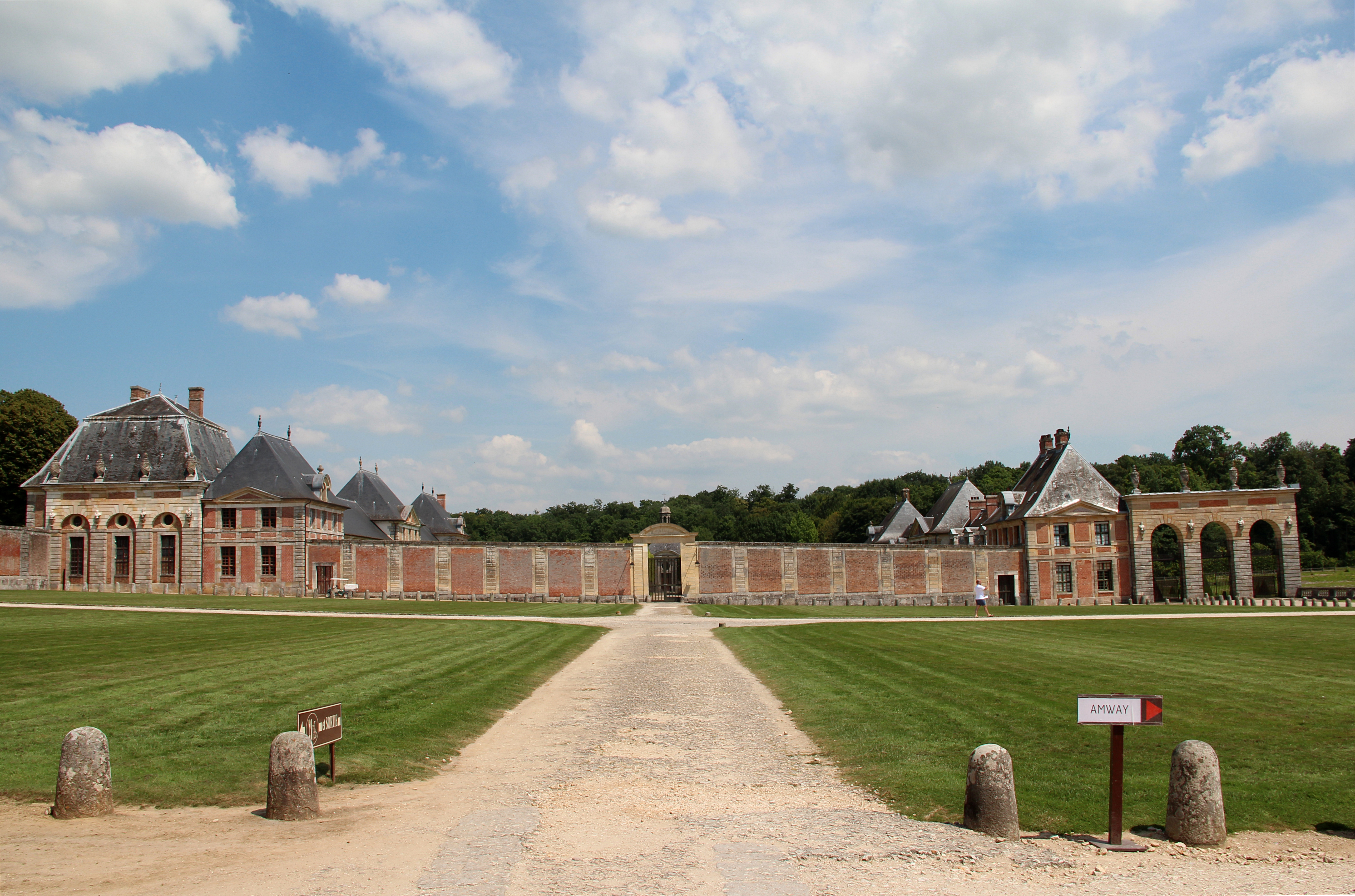 Cour des Bornes, ferme et communs du château de Vaux-le-Vicomte - Maincy (Seine-et-Marne, France).